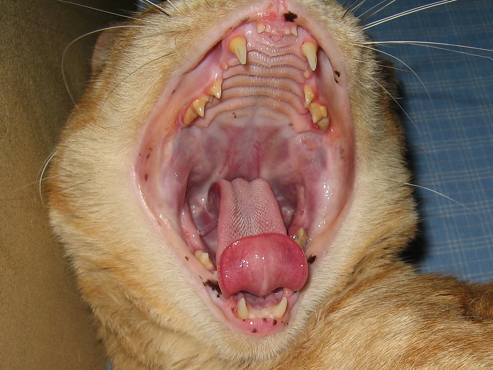 Detalhe do interior da boca de um gato onde pode ver-se a dentição incompleta, palato, entrada do órgão vomeronasal e língua.